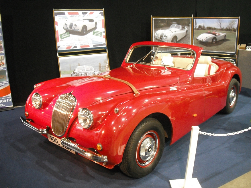 Jag